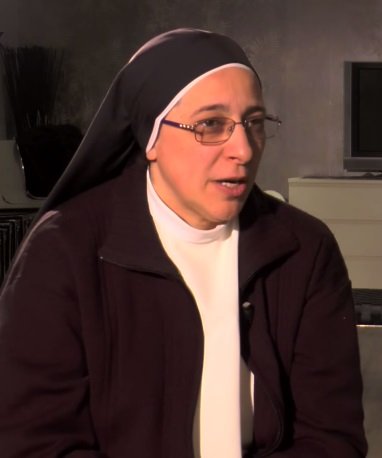 Sor Lucía Caram